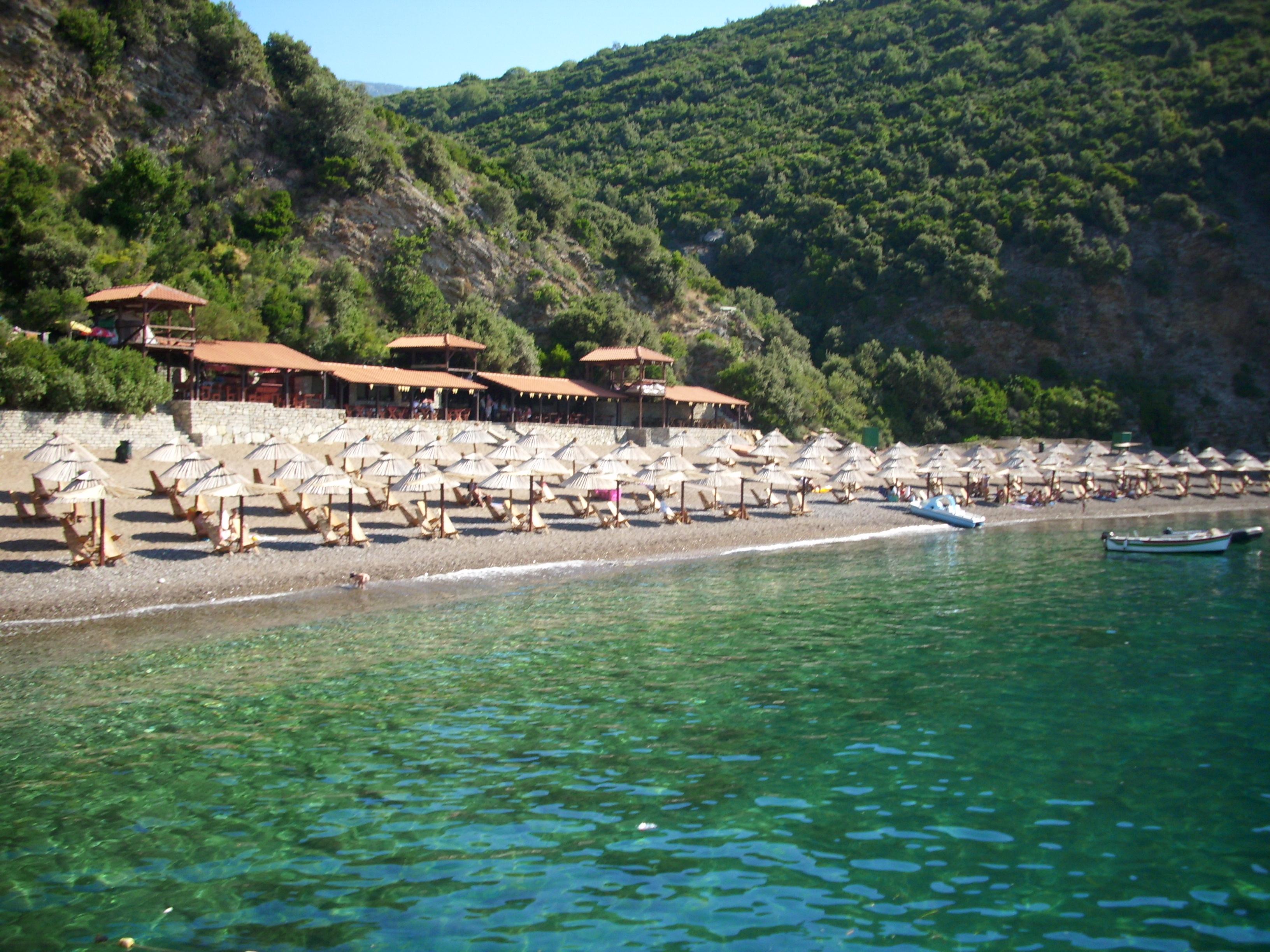 Kraljičina plaža u Crnoj Gori